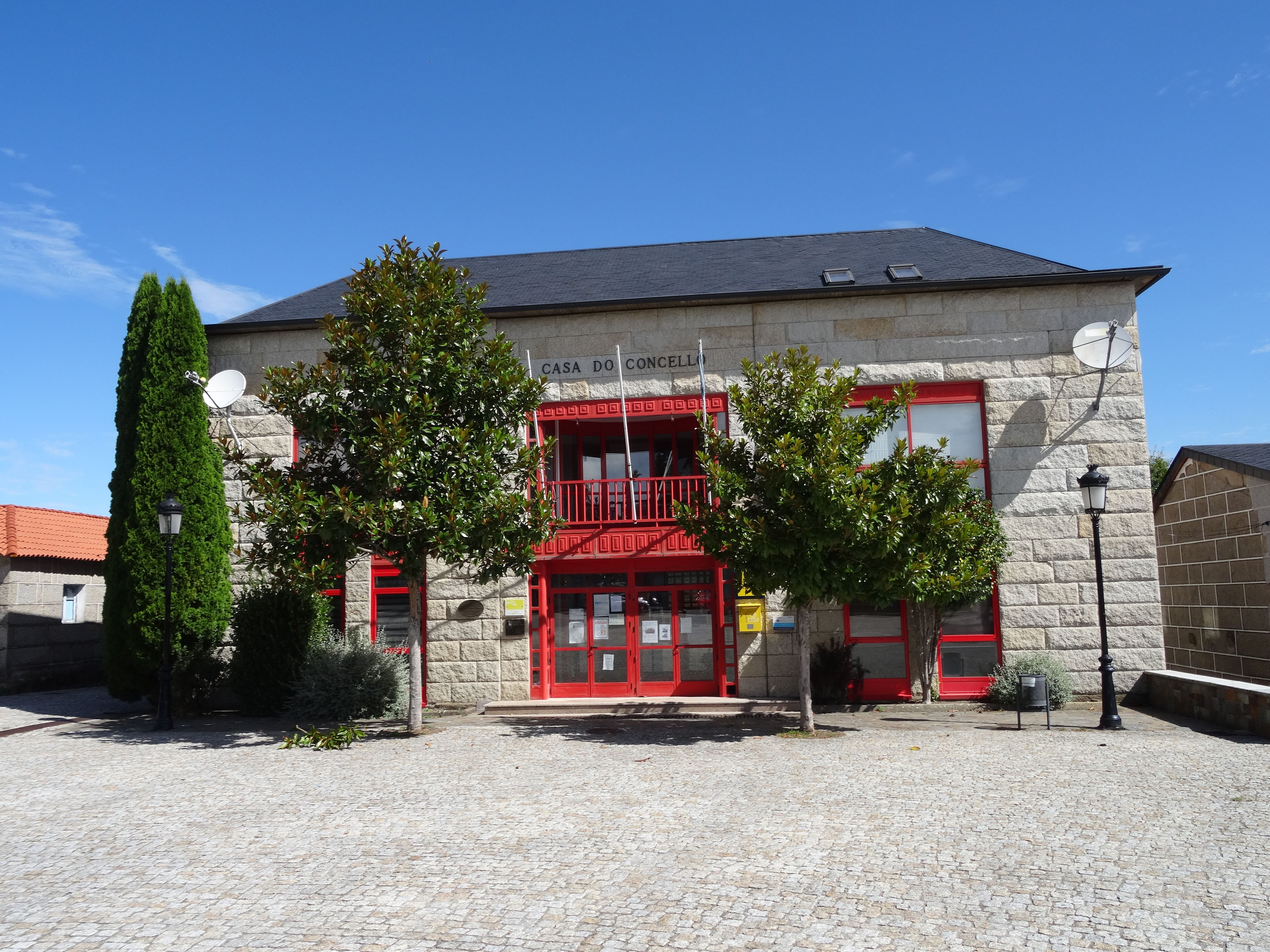 Ver título.